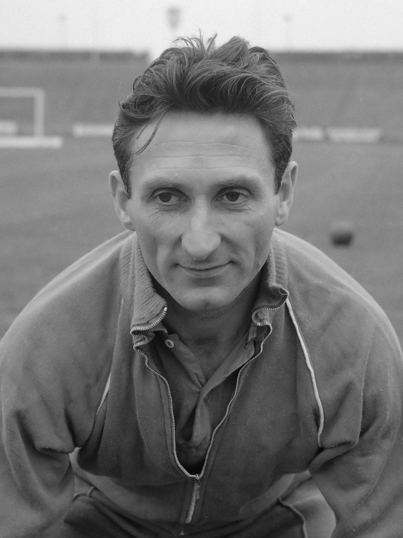 Voetbalkoppen Faas Wilkes 23 april 1961